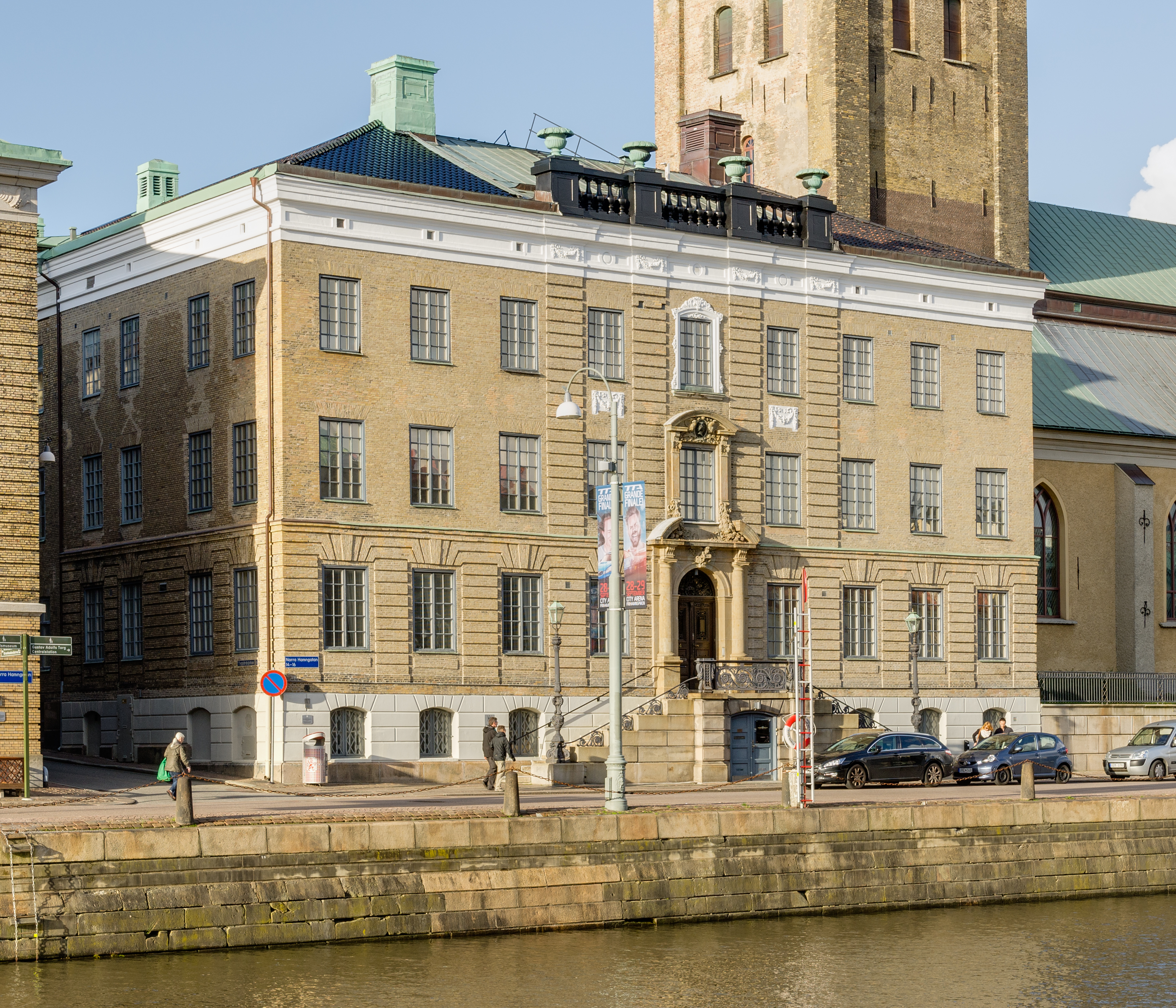 Sahlgrenska huset, built 1753. (Nordstaden 11:1 Rådhuset 1) In the backgroud, the German church. Gothenburg, Sweden.